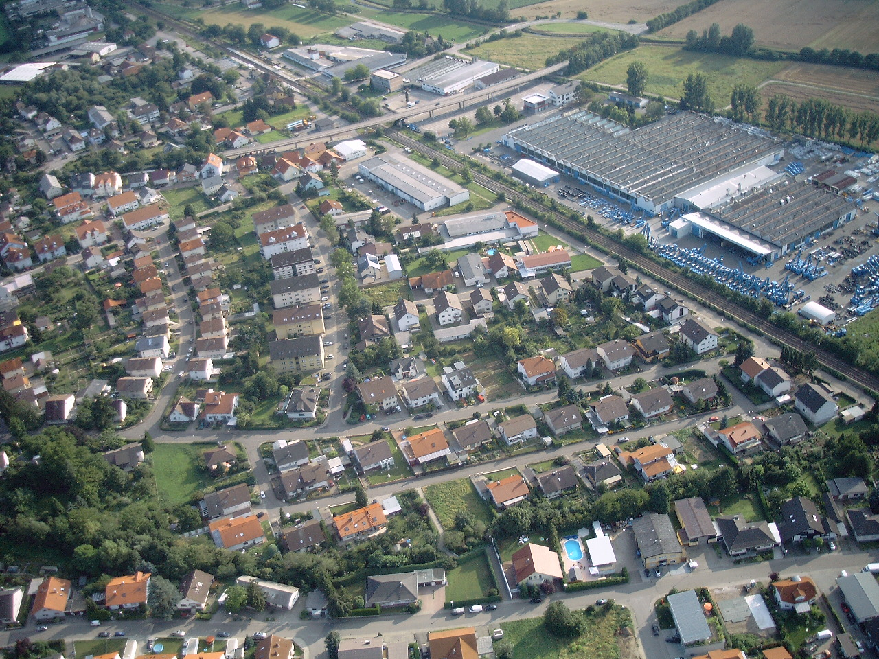 Bad Schönborn, Gelände des Lademaschinenherstellers Terex/Fuchs